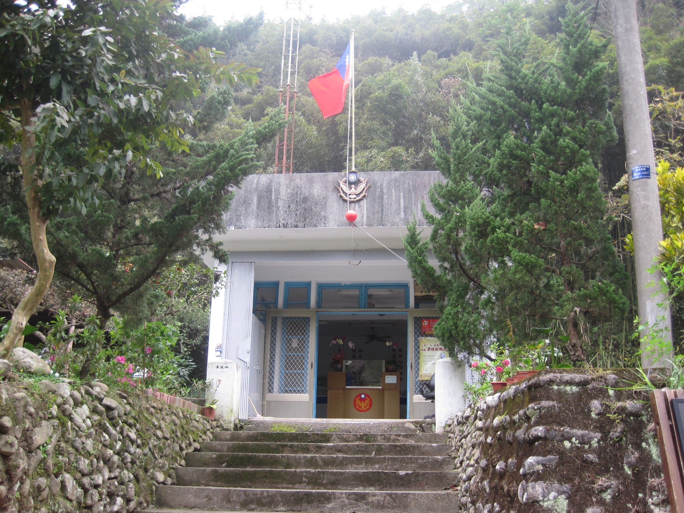 新竹縣五峰鄉 新竹縣政府警察局竹東分局清泉派出所